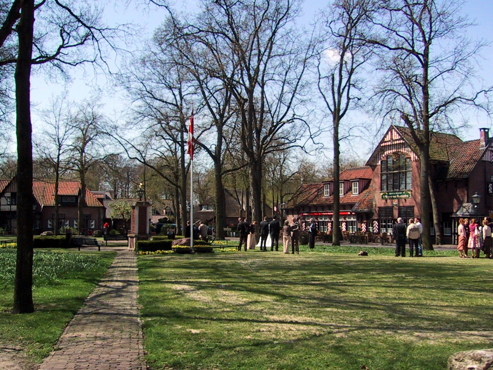 Foto van het dorpsplein in Haarzuilens, zelf gemaakt tijdens een fietstocht.